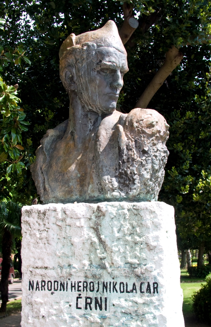 Spomenik Nikoli Caru u Crikvenici, rad Zvonka Cara